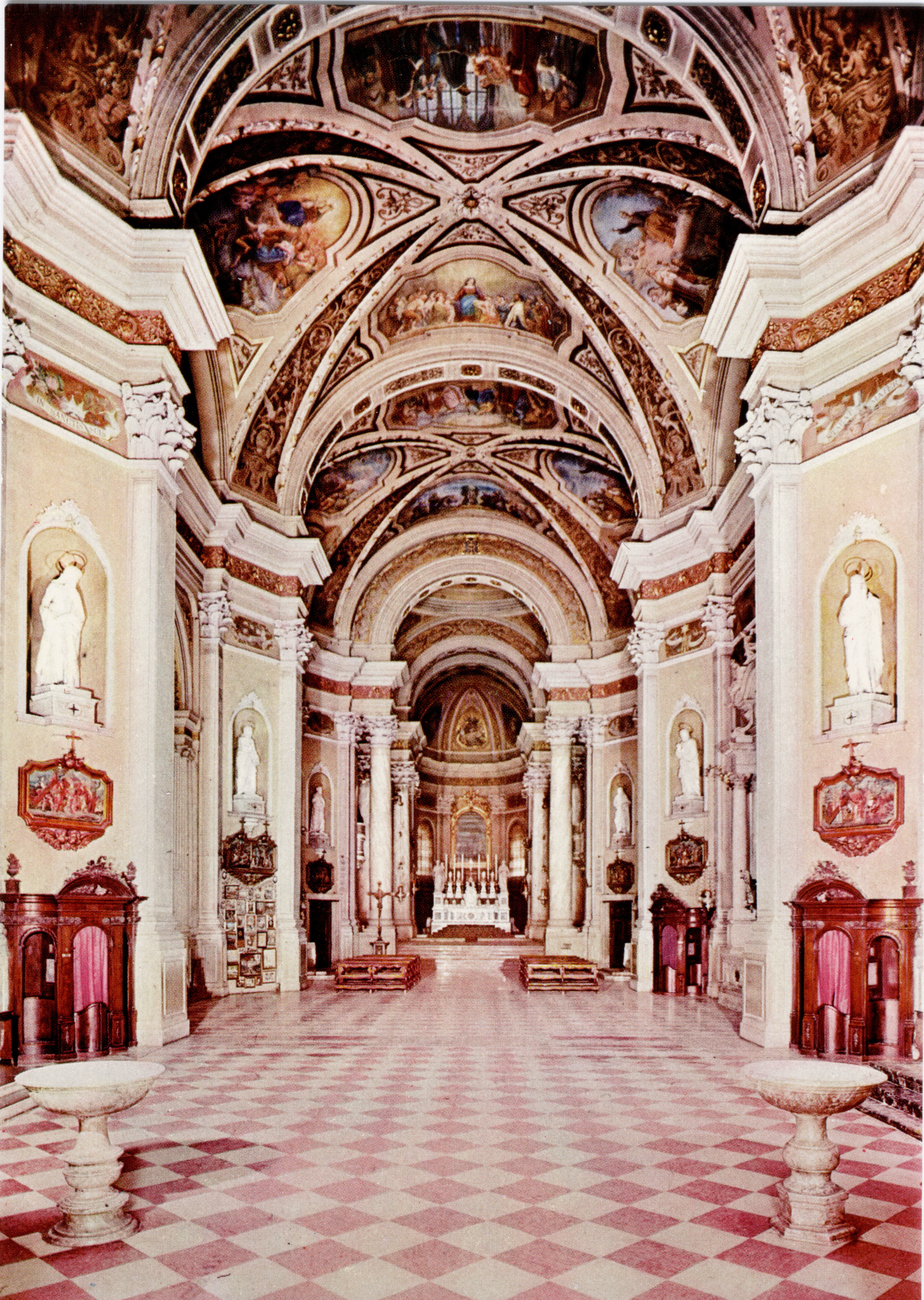 Udine - Chiesa della Beata Vergine delle Grazie